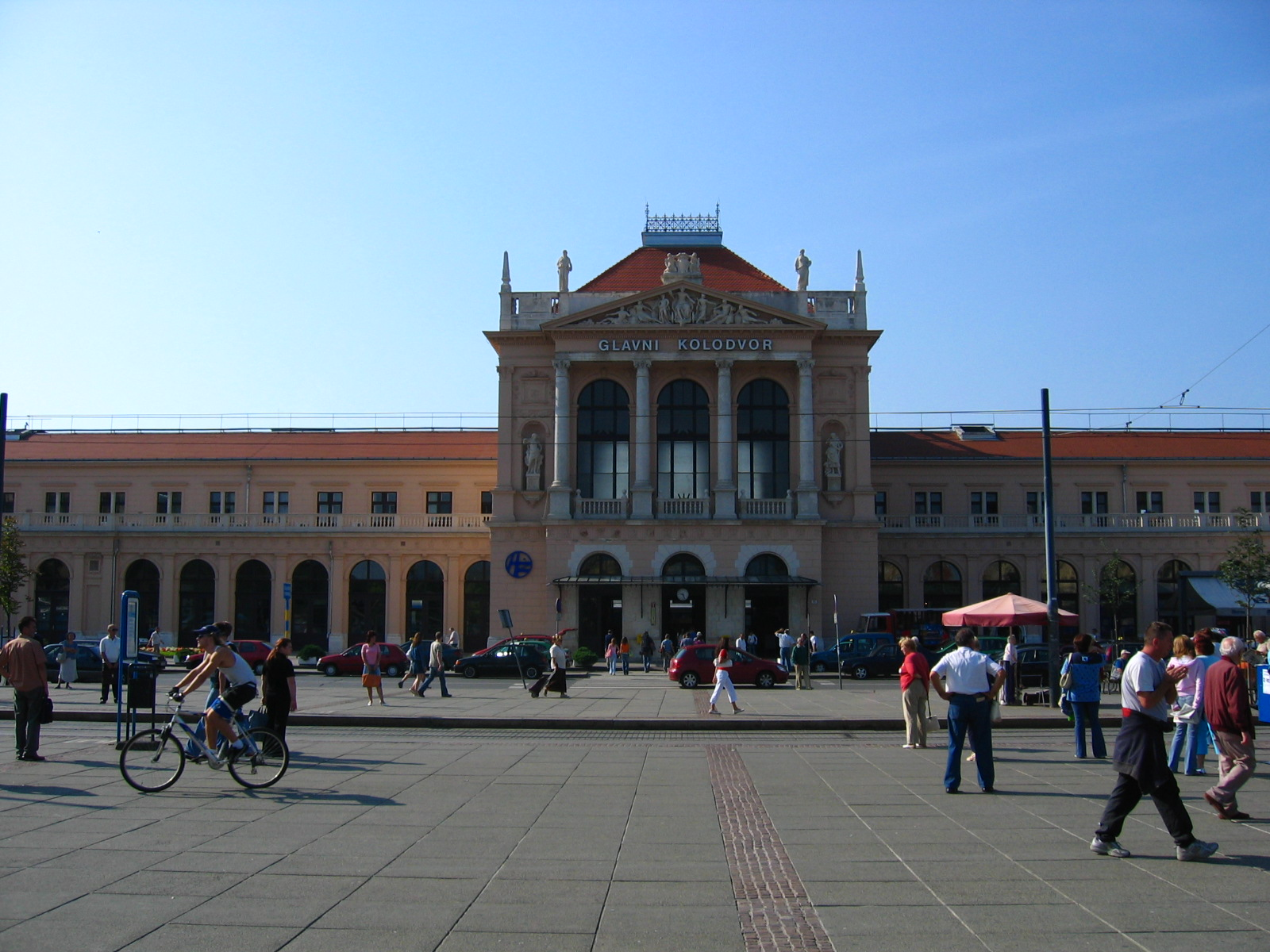 Main Station (Glavni kolodvor), Zagreb, Croatia